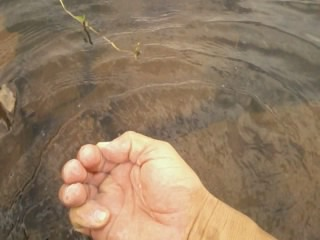 Fotografia mostrando a qualidade da água do Rio Tietê em Araçatuba